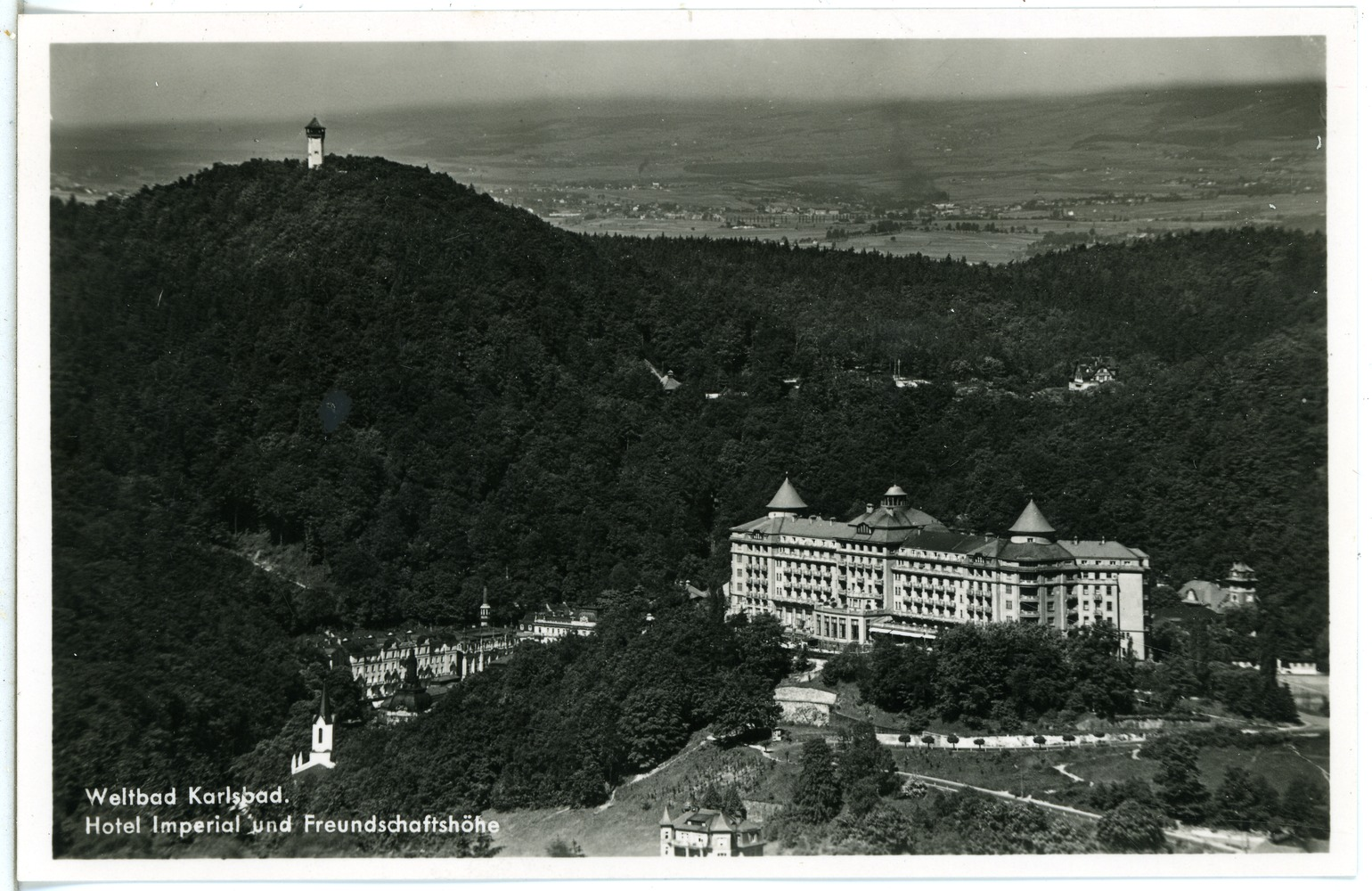 Karlsbad; Hotel Imperial und Freundschaftshöhe This postcard is from publisher Brück & Sohn in Meißen ( postcard has a unique number 27427 and is available in a higher resolution at the publisher. This images was uploaded in a cooperation project between Wikipedians and the publisher.